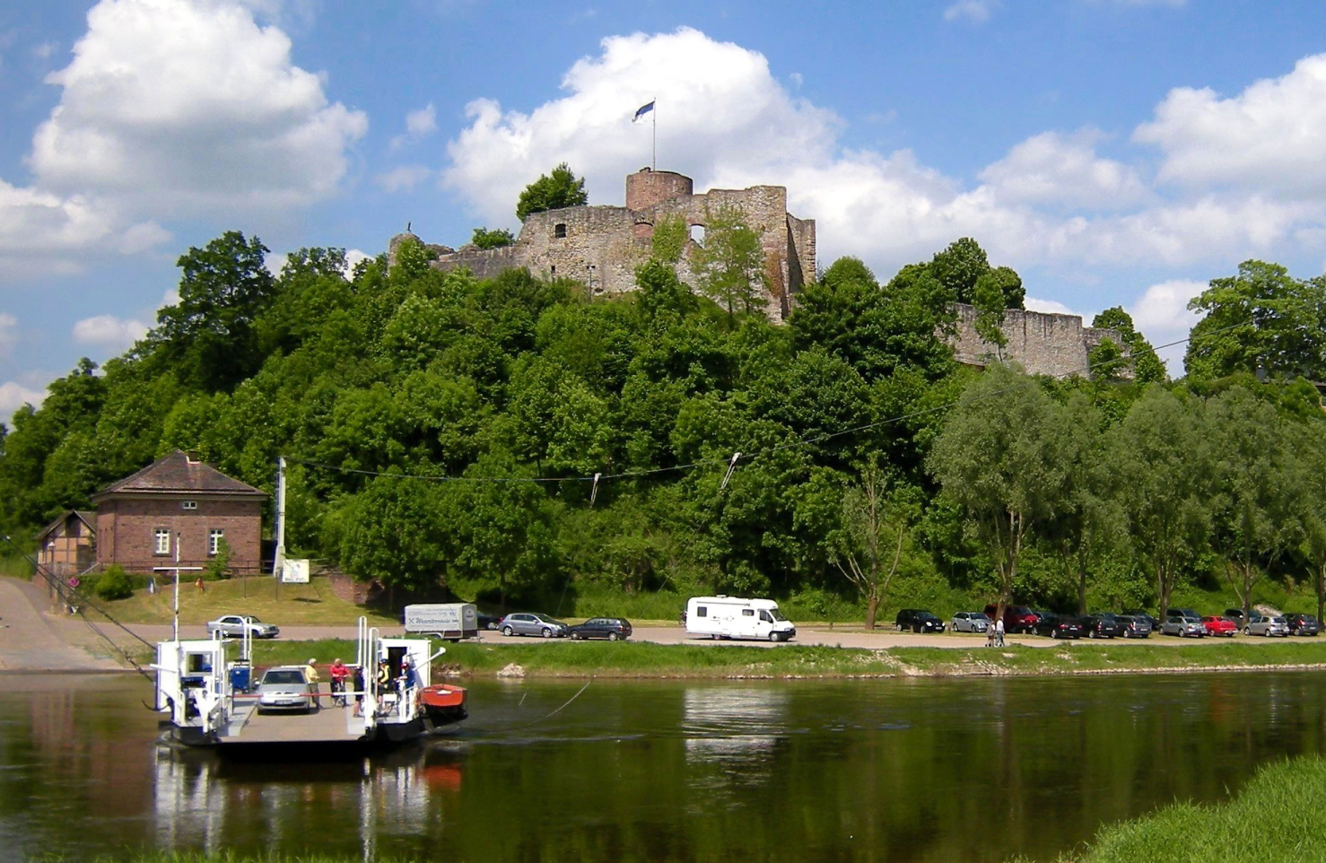 Polle-Burgruine mit Weserfähre.jpg